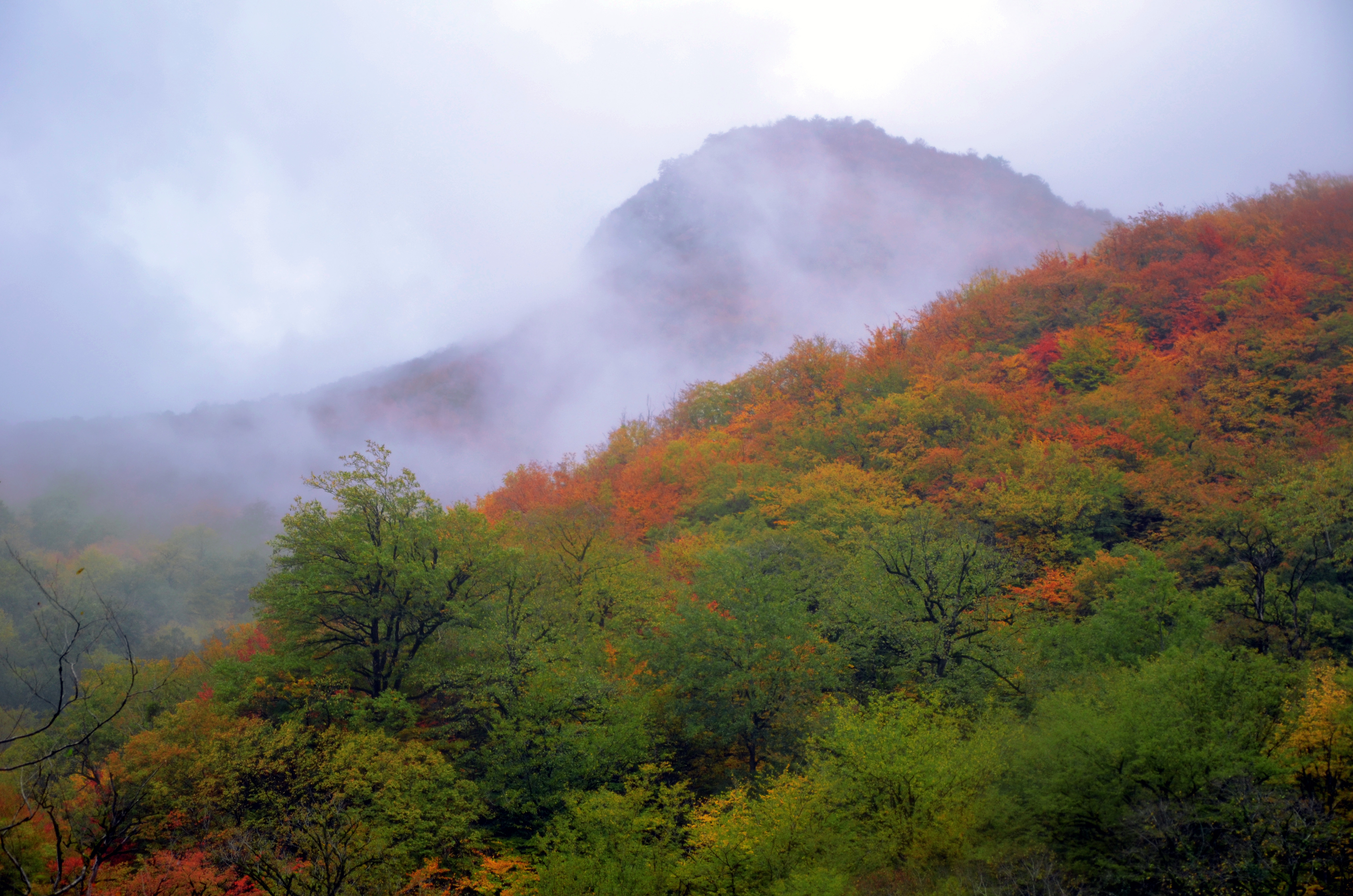 Mazandaran - Royan - Galandroud